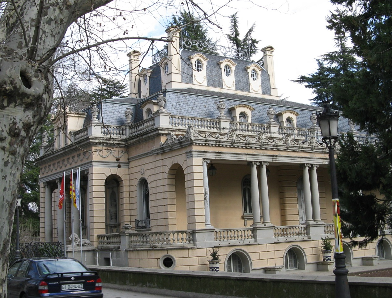 Villa Torre Malagrida at Olot (Catalunya, Spain; now Youth hostal)